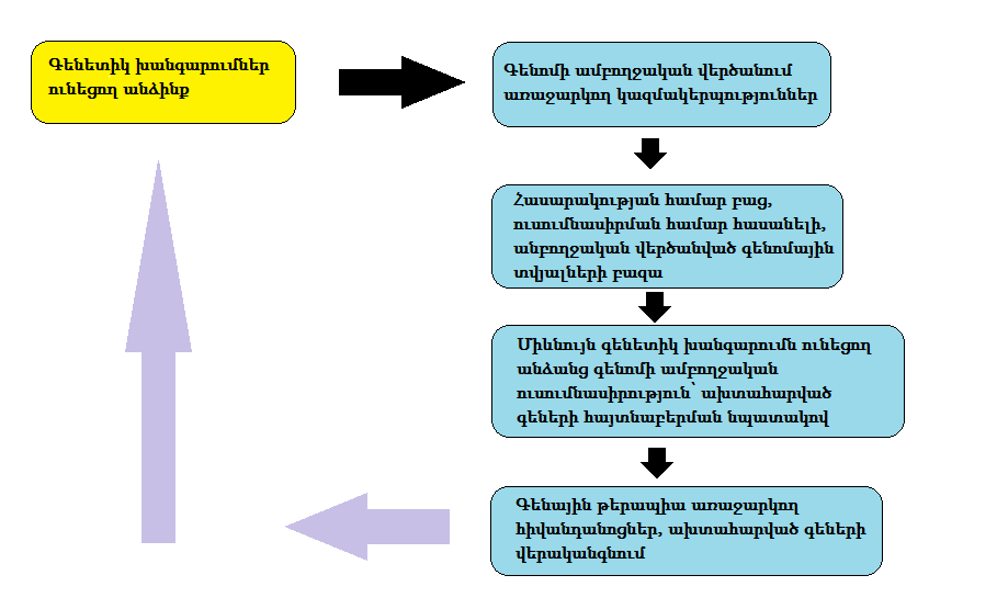 Գենոմից դեպի գենային թերապիա